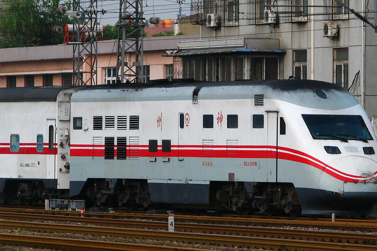 The power car of China Railways NZJ2 "Shenzhou" diesel multiple train